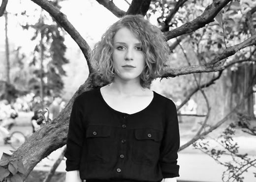 фестиваль "Черешневый лес"